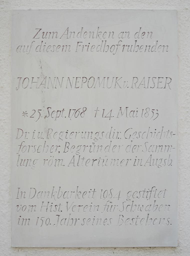 Epitaph des Historikers Johann Nepomuk Raiser, 1768-1853, an der Kirche St. Michael des Hermanfriedhofs in Augsburg